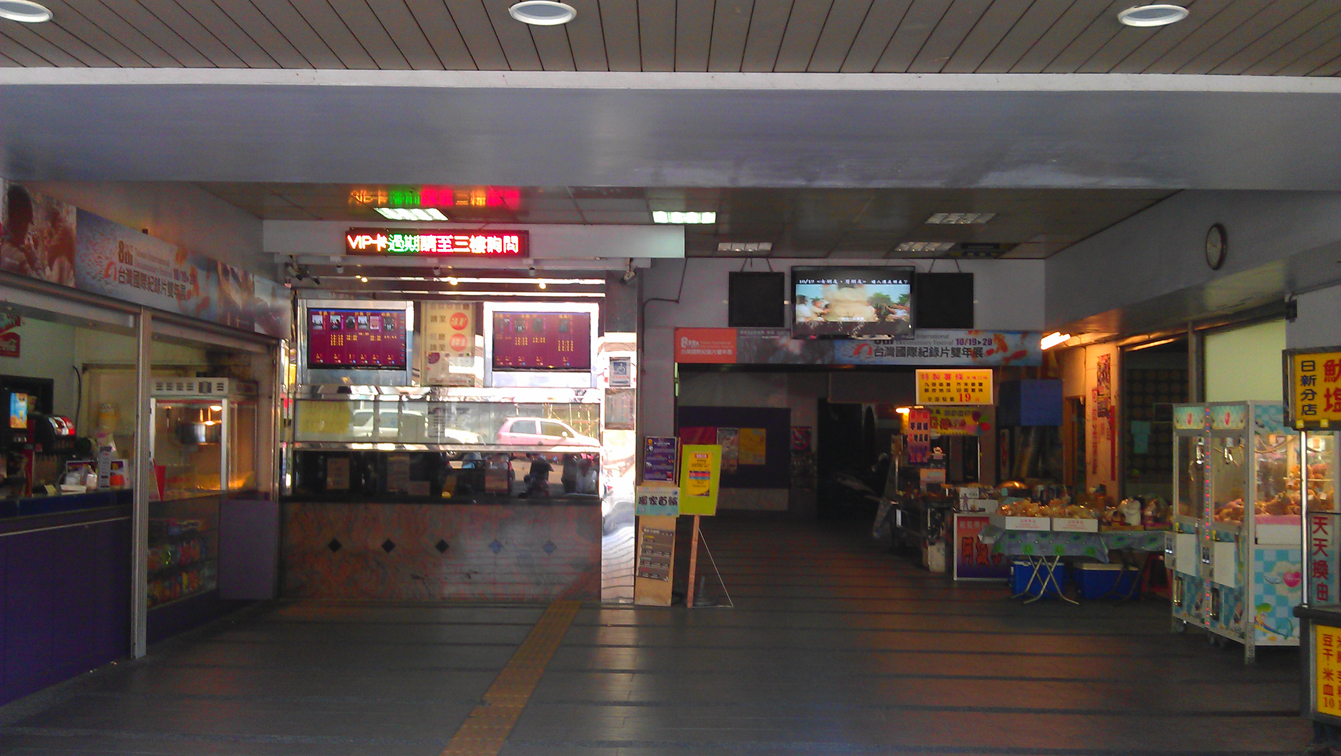 萬代福影城一樓。